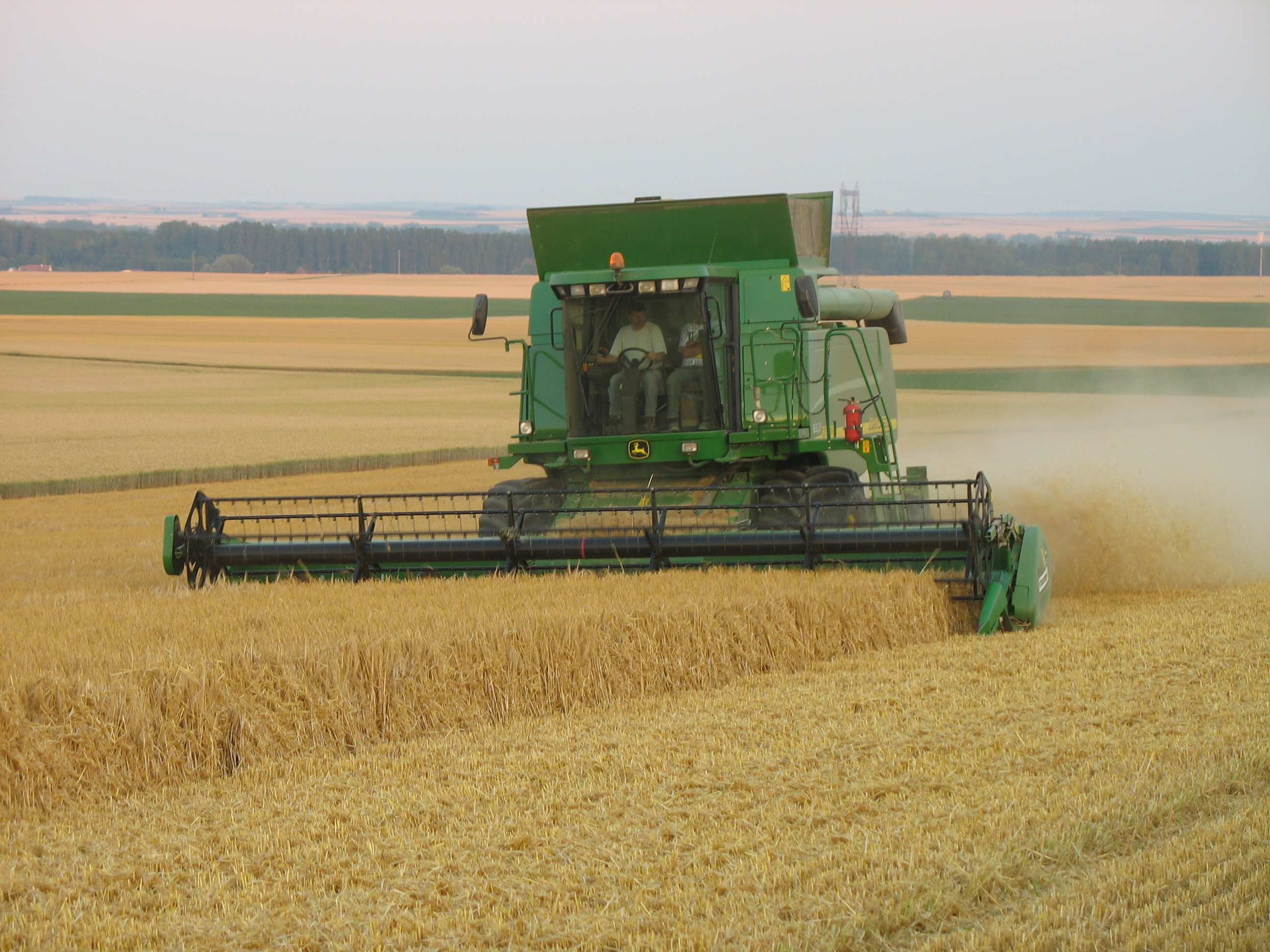 Moisson John Deere